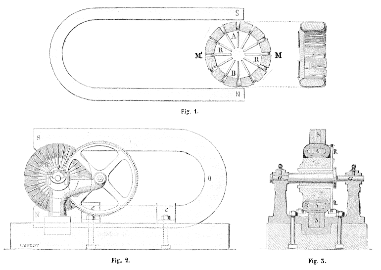 Coupes de la machine de Gramme